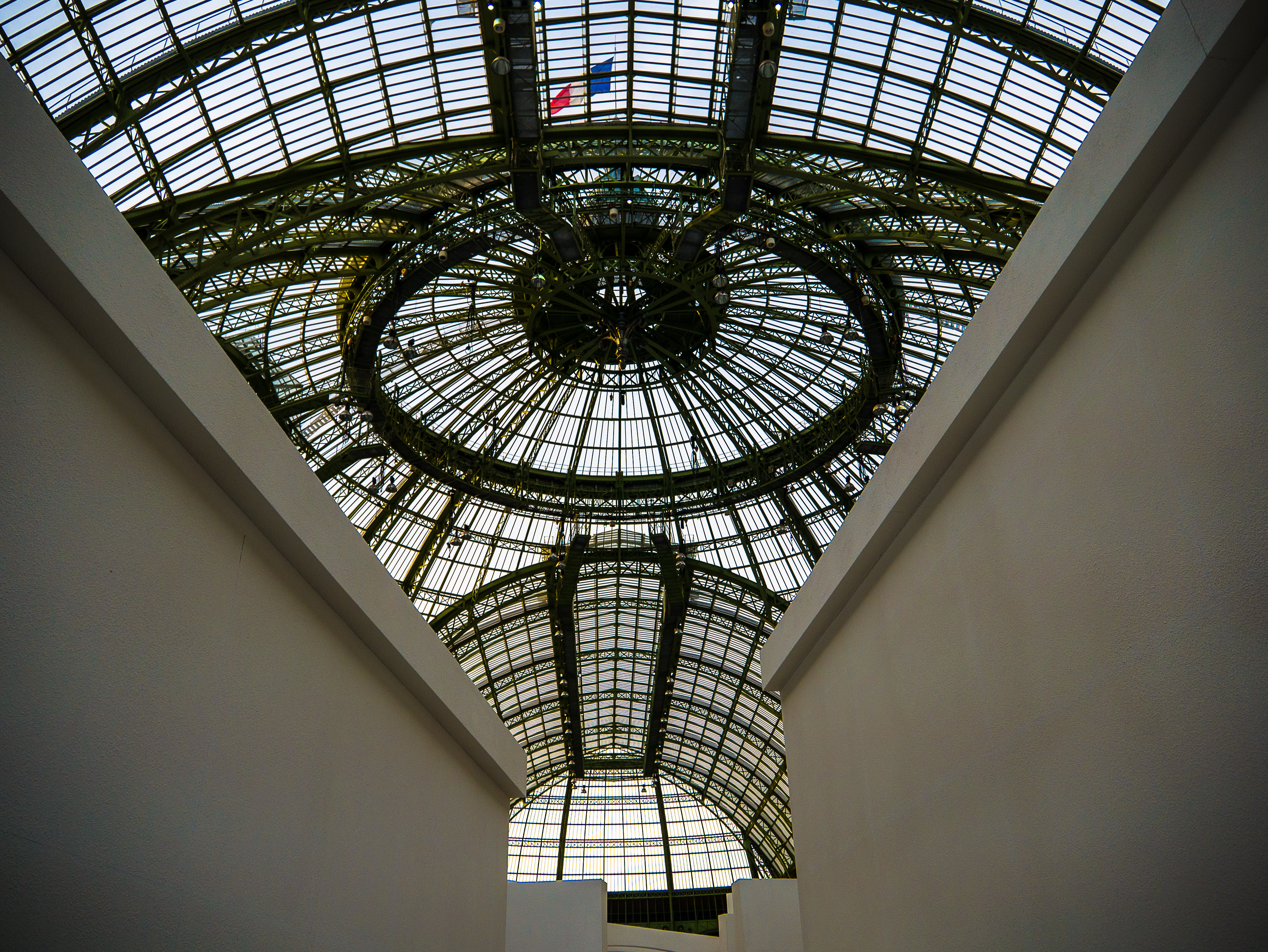 La verrière du Grand Palais